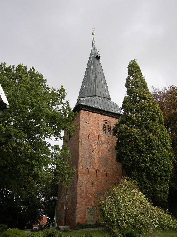 Die Kirche St. Jacobi in Cuxhaven Lüdingworth